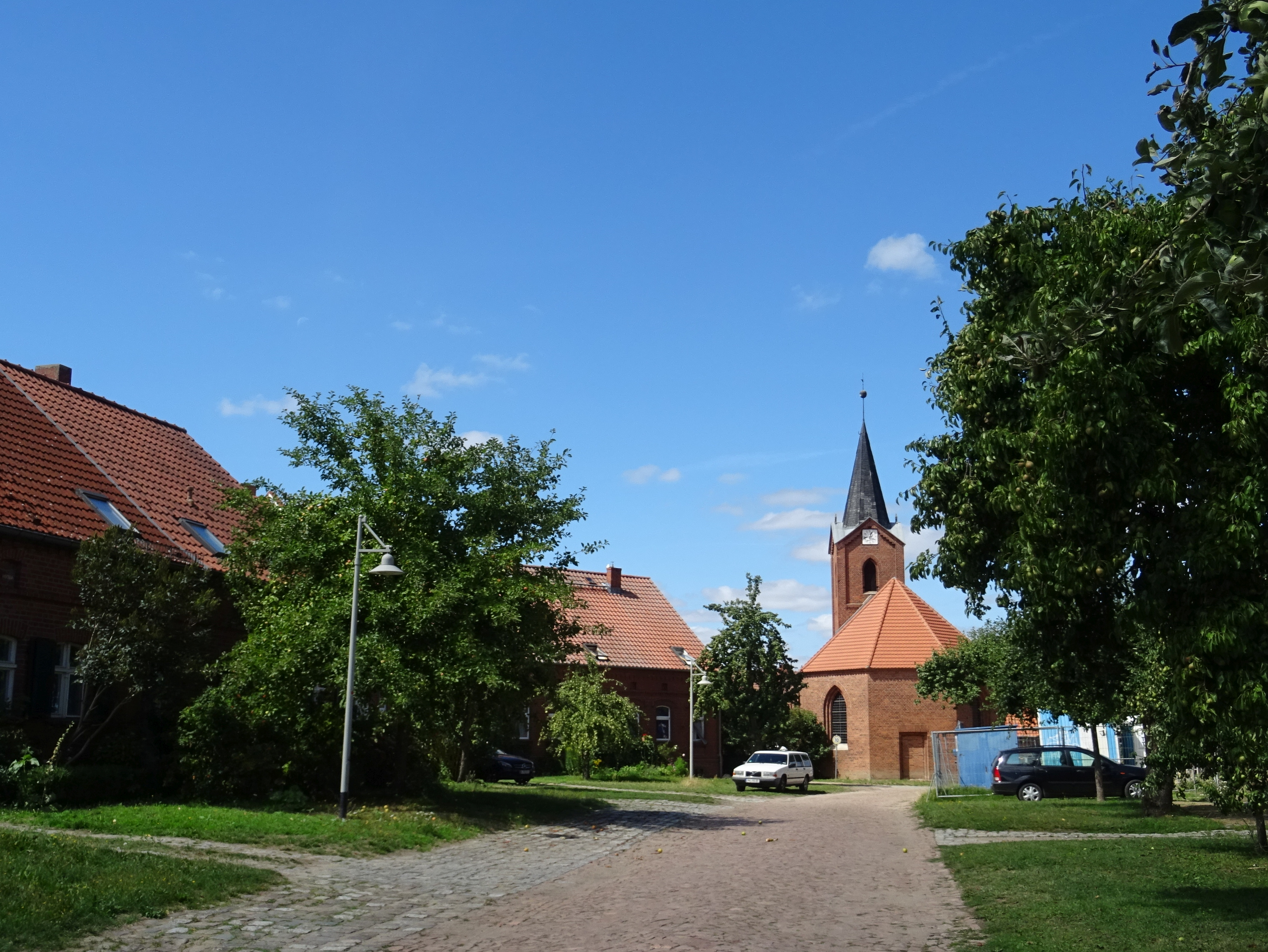 Vehlgast, denkmalgeschützter Dorfkern